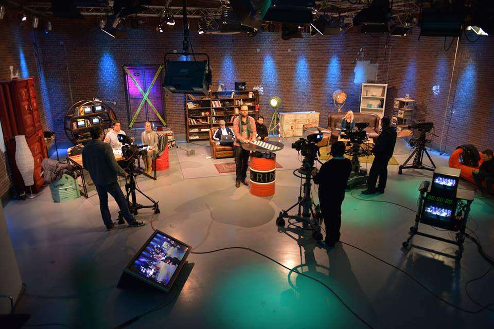 Studiototale NRW.TV